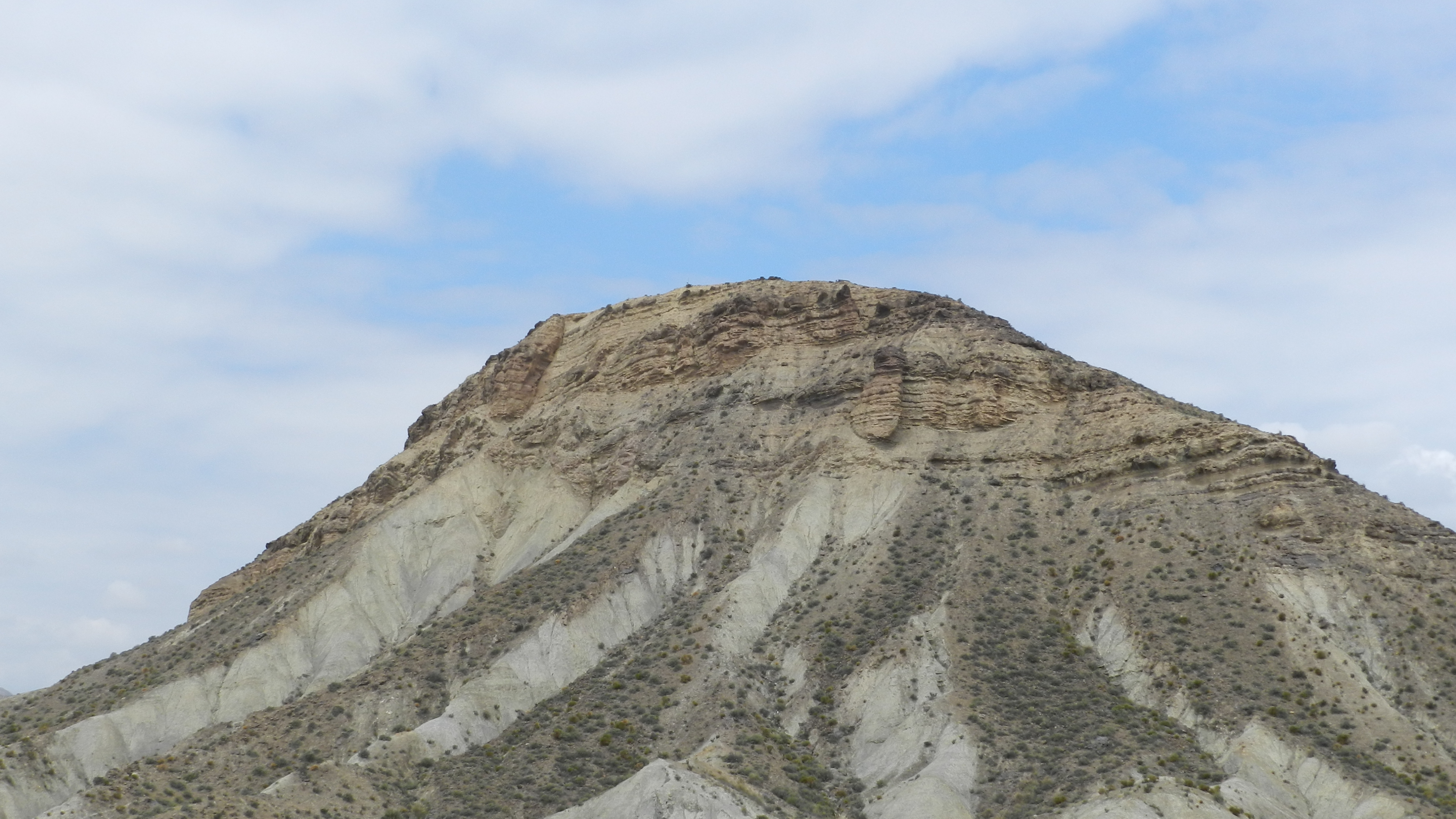 Montaña típica del desierto de Tabernas.